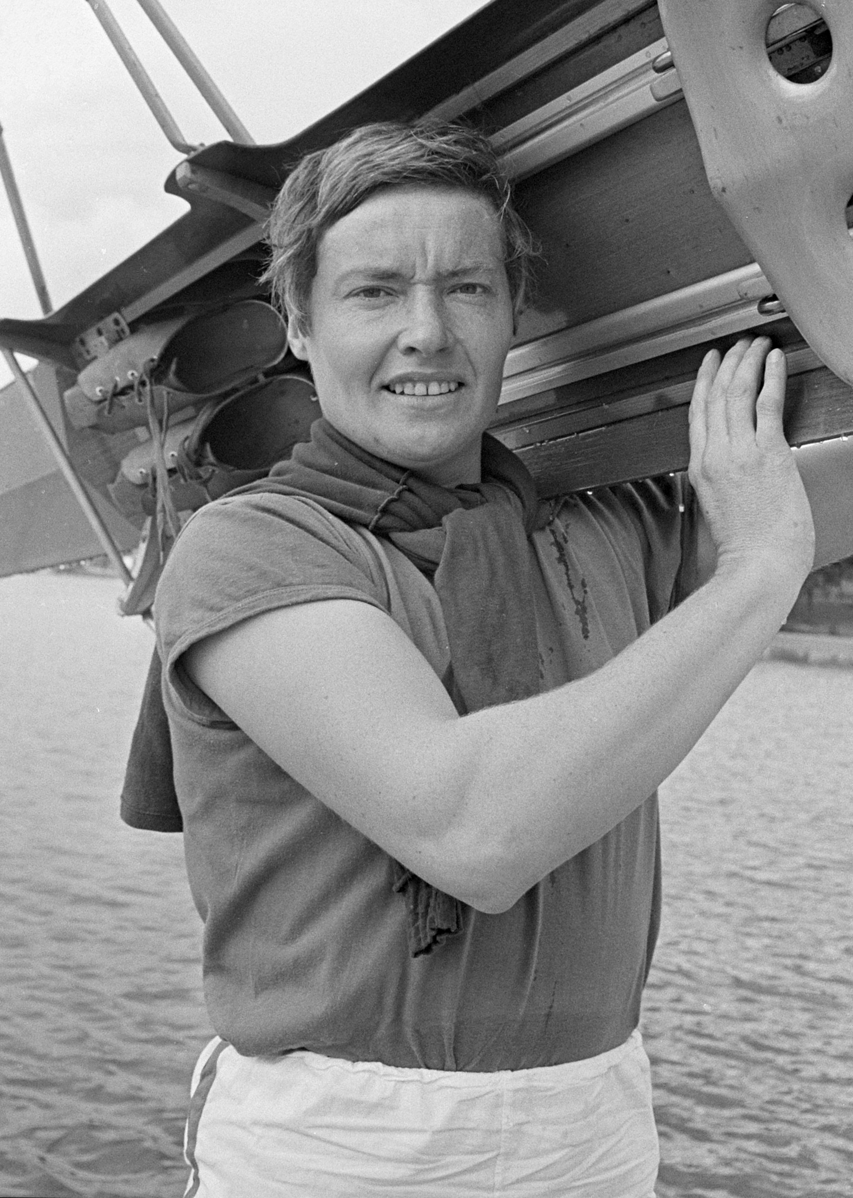 Europese Roeikampioenschappen, Rene Camu kampioene Frankrijk skif, met skif op de schouders 23 augustus 1966